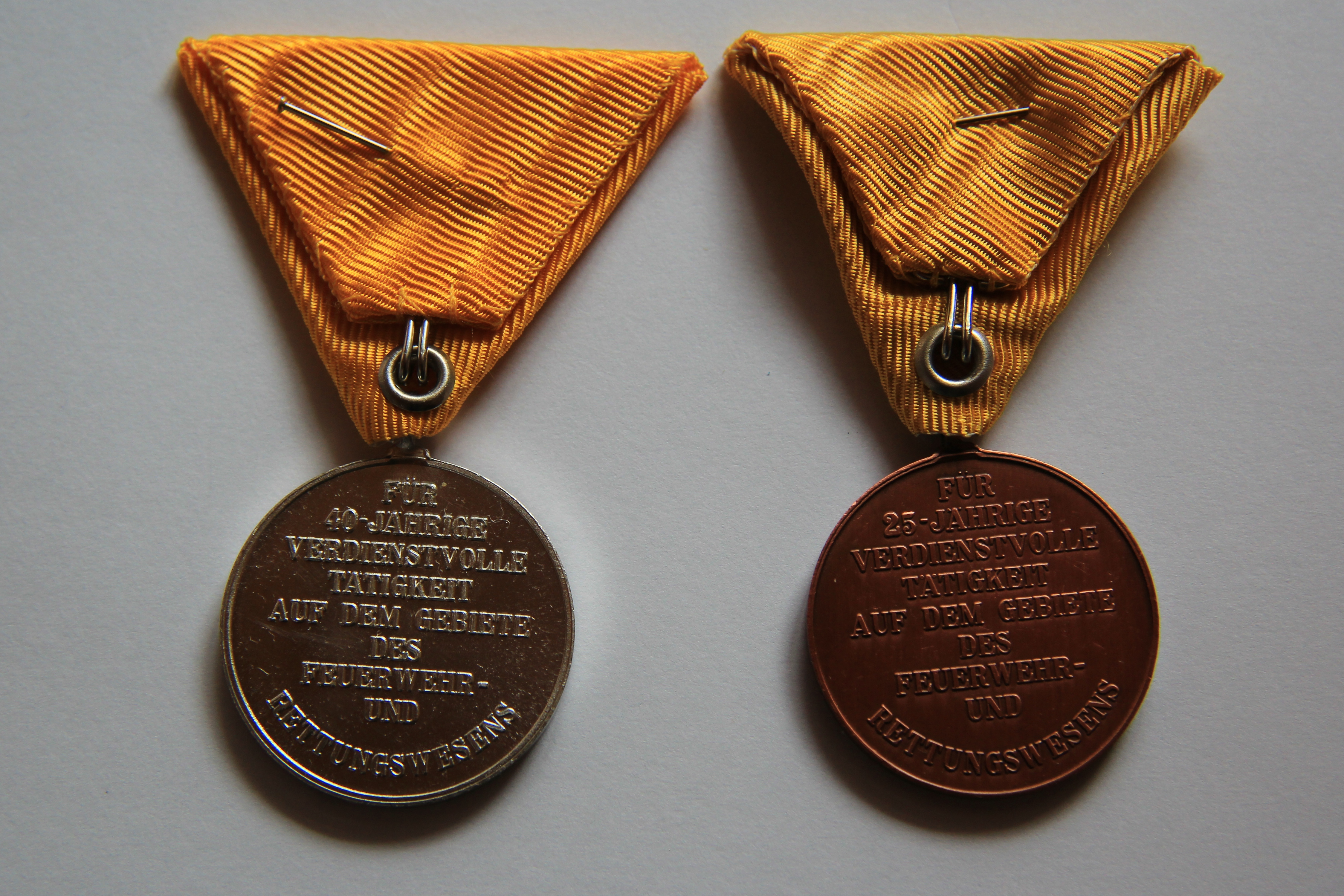 Ehrenzeichen für vieljährige Verdienste auf dem Gebiete des Feuerwehr- und Rettungswesens für 25 Jahre, Rückseite